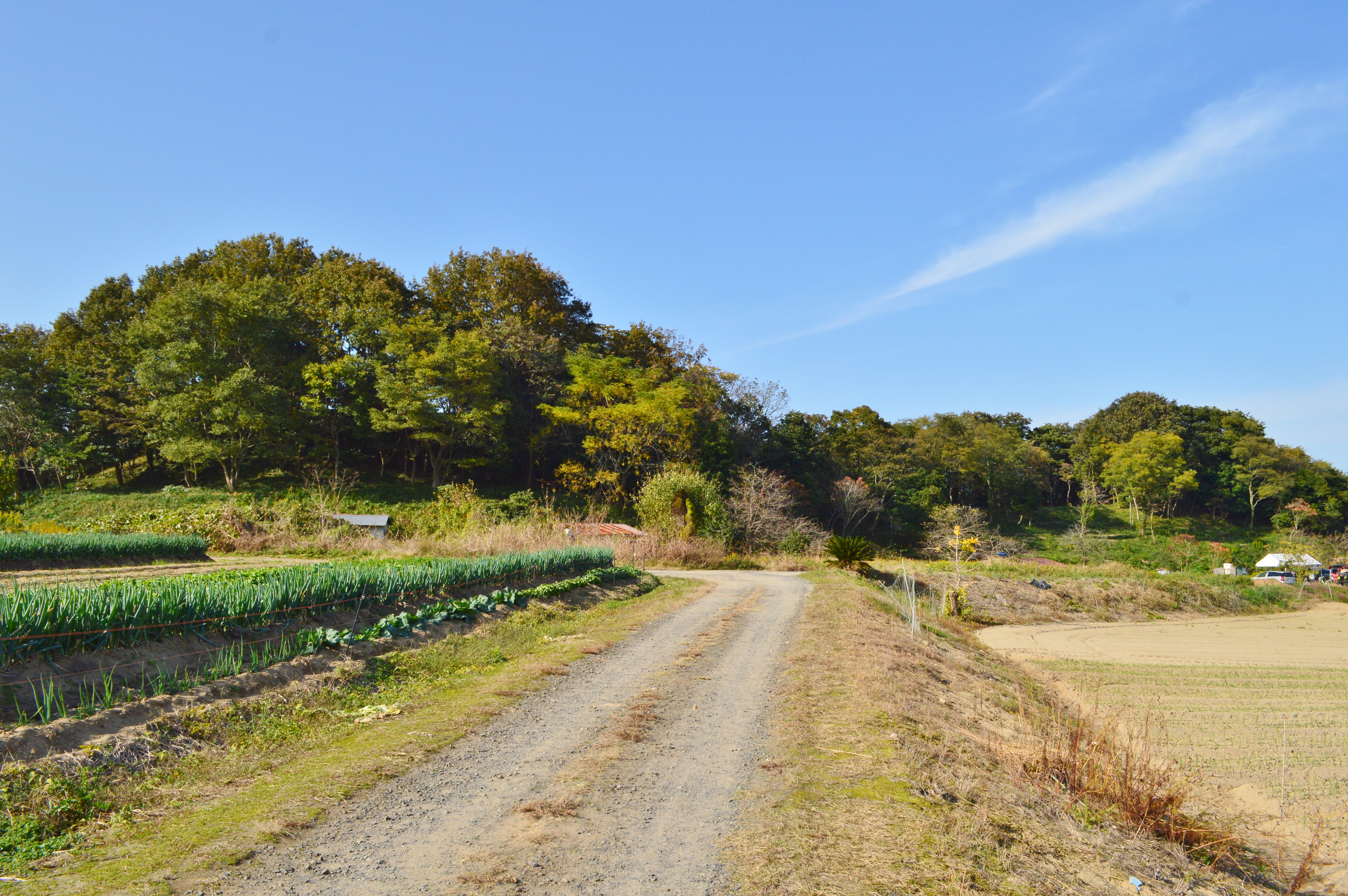 網野銚子山古墳 墳丘全景